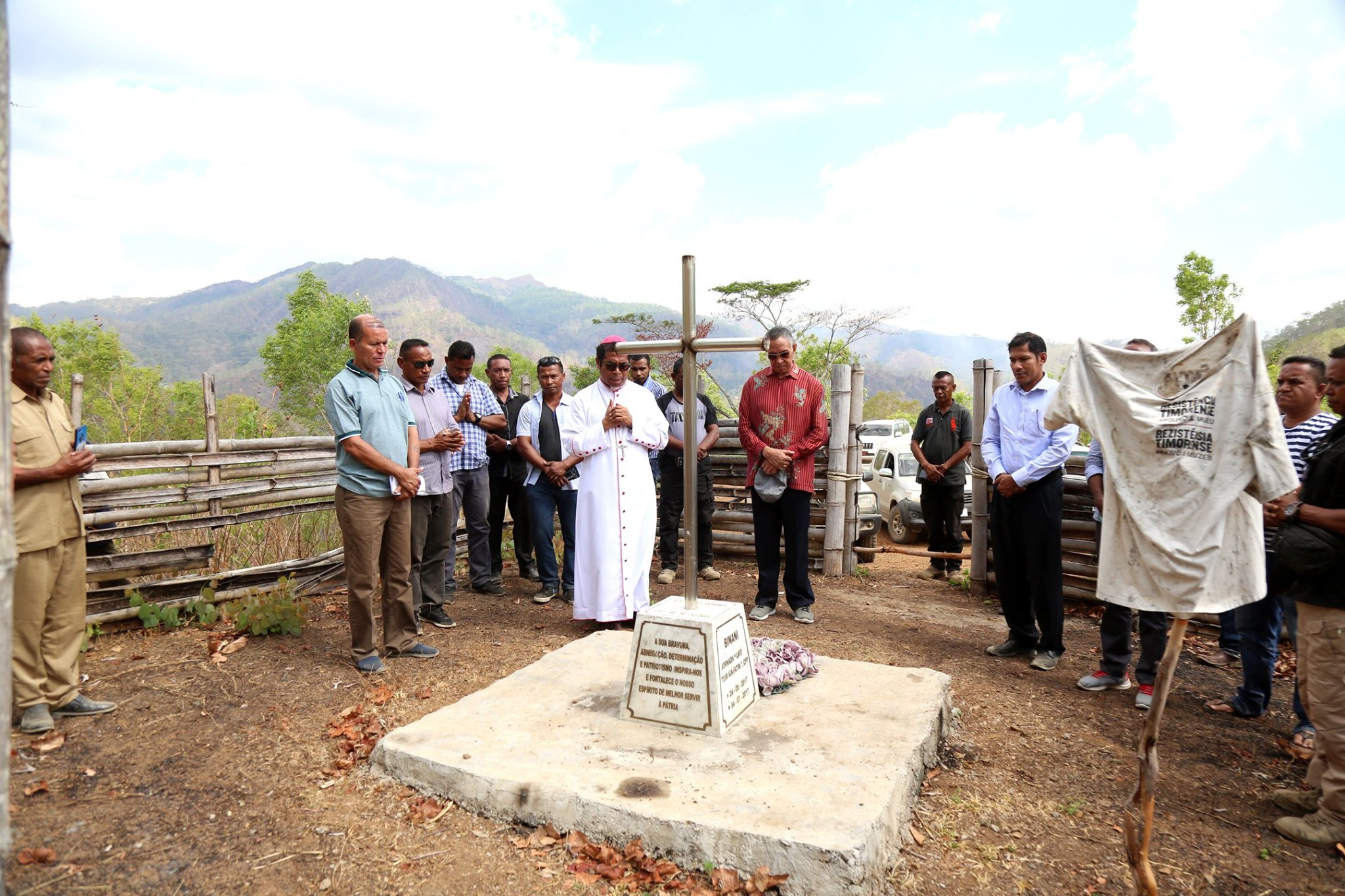 Einweihung von Kapelle und Gedenkstätte für Lobato in Mindelo mit Arão Noé da Costa Amaral, Virgílio do Carmo da Silva und José Maria Barreto Lobato Gonçalves